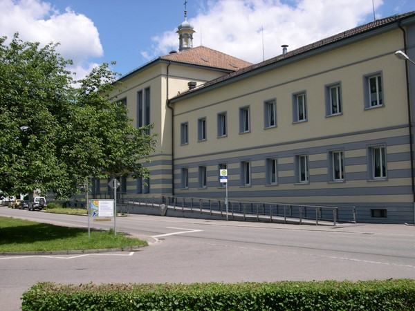 St. Josefshaus Herten, Hauptgebäude